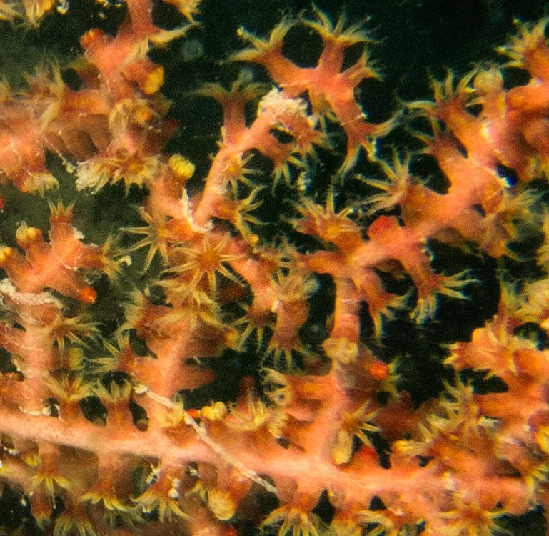 Vista de pólipos de Echinogorgia sp en Koh Phangan, Tailandia